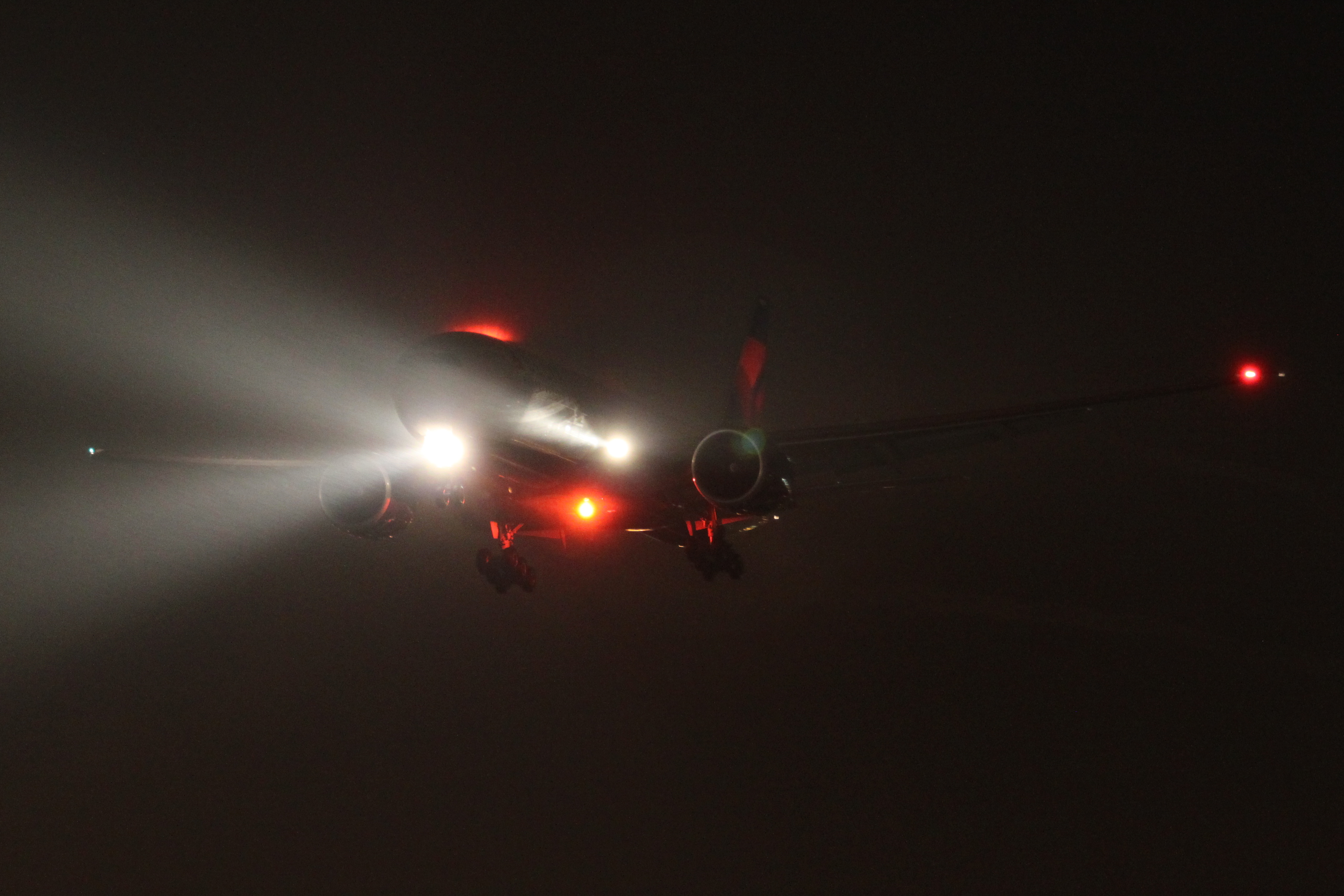 DAL B777 Landing RWY 9R